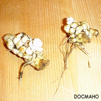 Lilium superbum bulbs